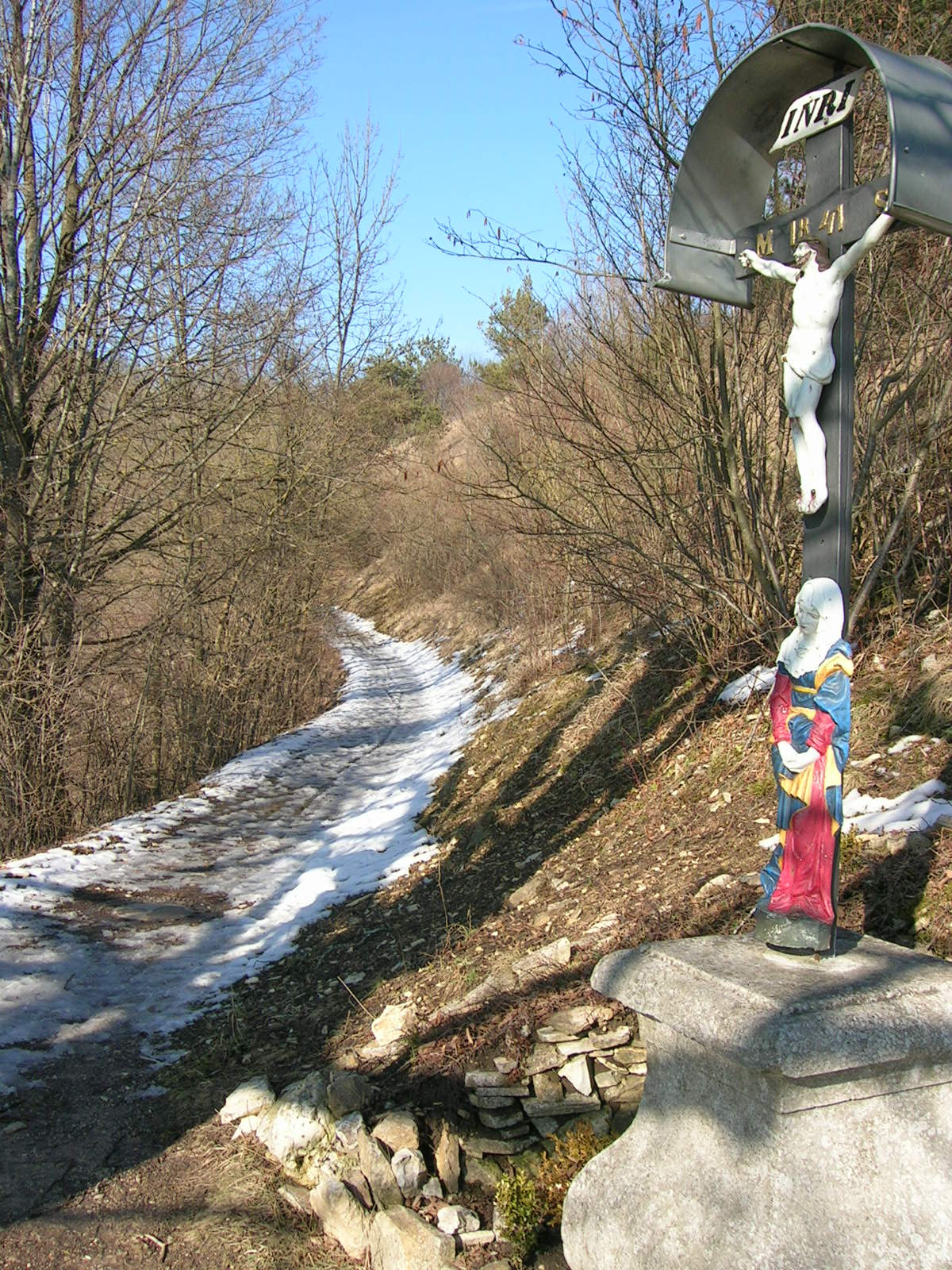 Wegkreuz bei Wolfsdrossel Wintershof, am Panoramaweg